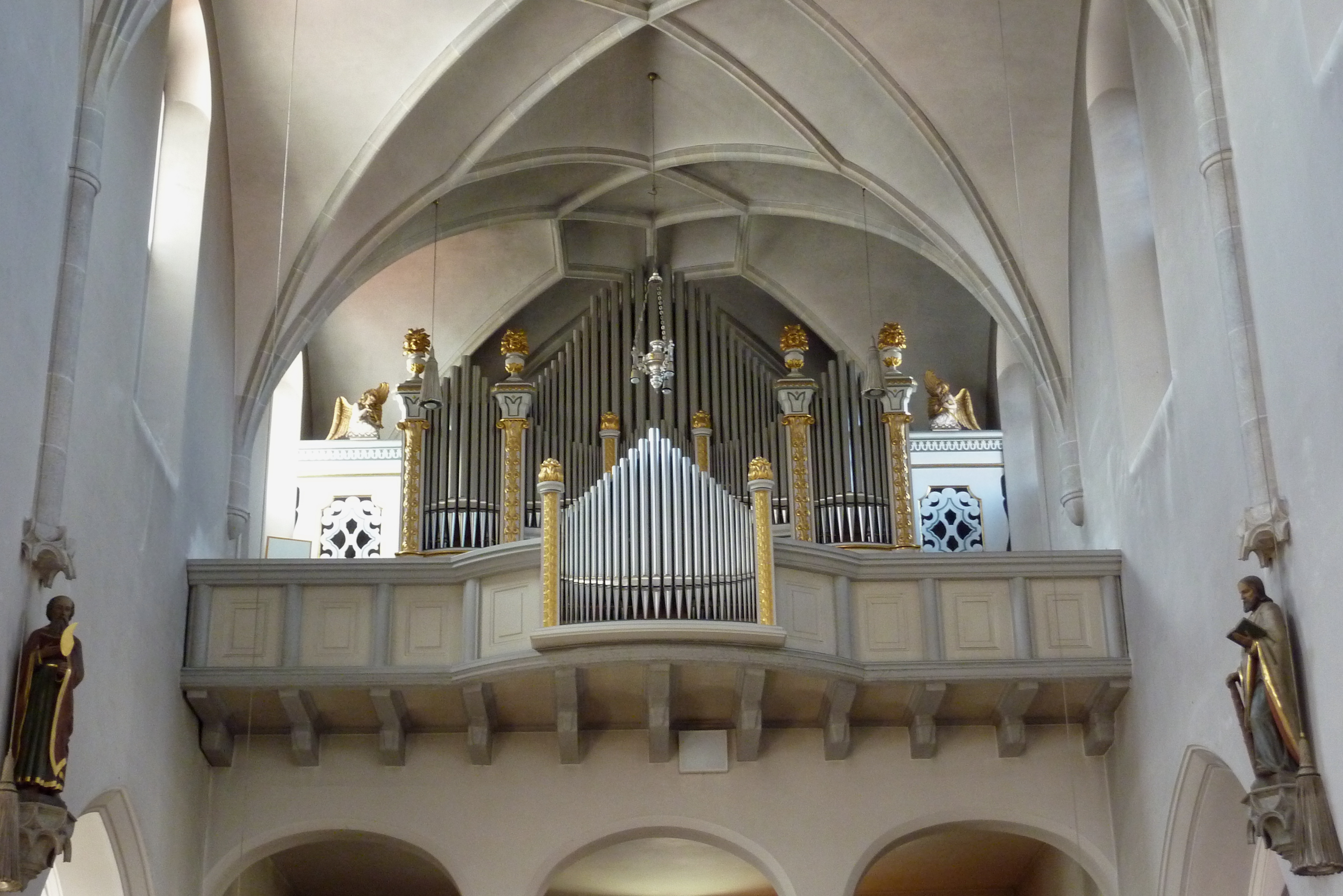 Katholische Stadtpfarrkirche Mariä Himmelfahrt in Aichach im Landkreis Aichach-Friedberg (Bayern), Orgel